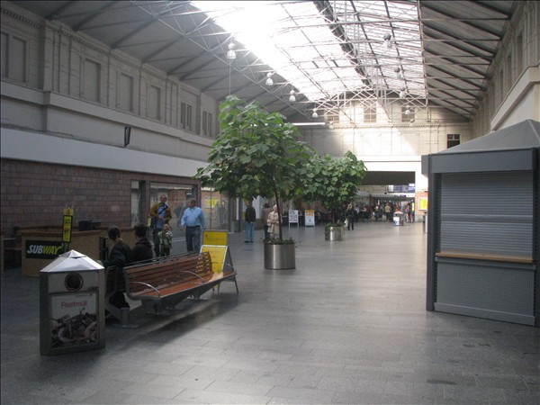 Eingangshalle des Chemnitzer Hbf's in Richtung Bahnsteighalle